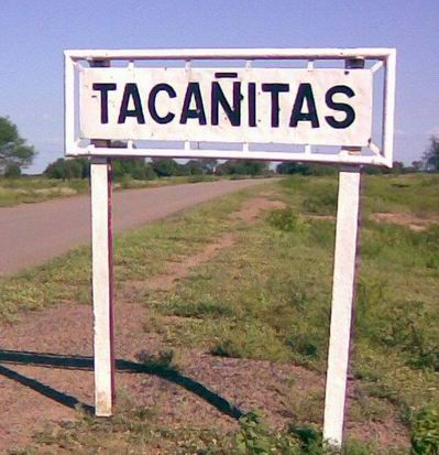 Por la ruta, llegando a Tacañitas. Cartel